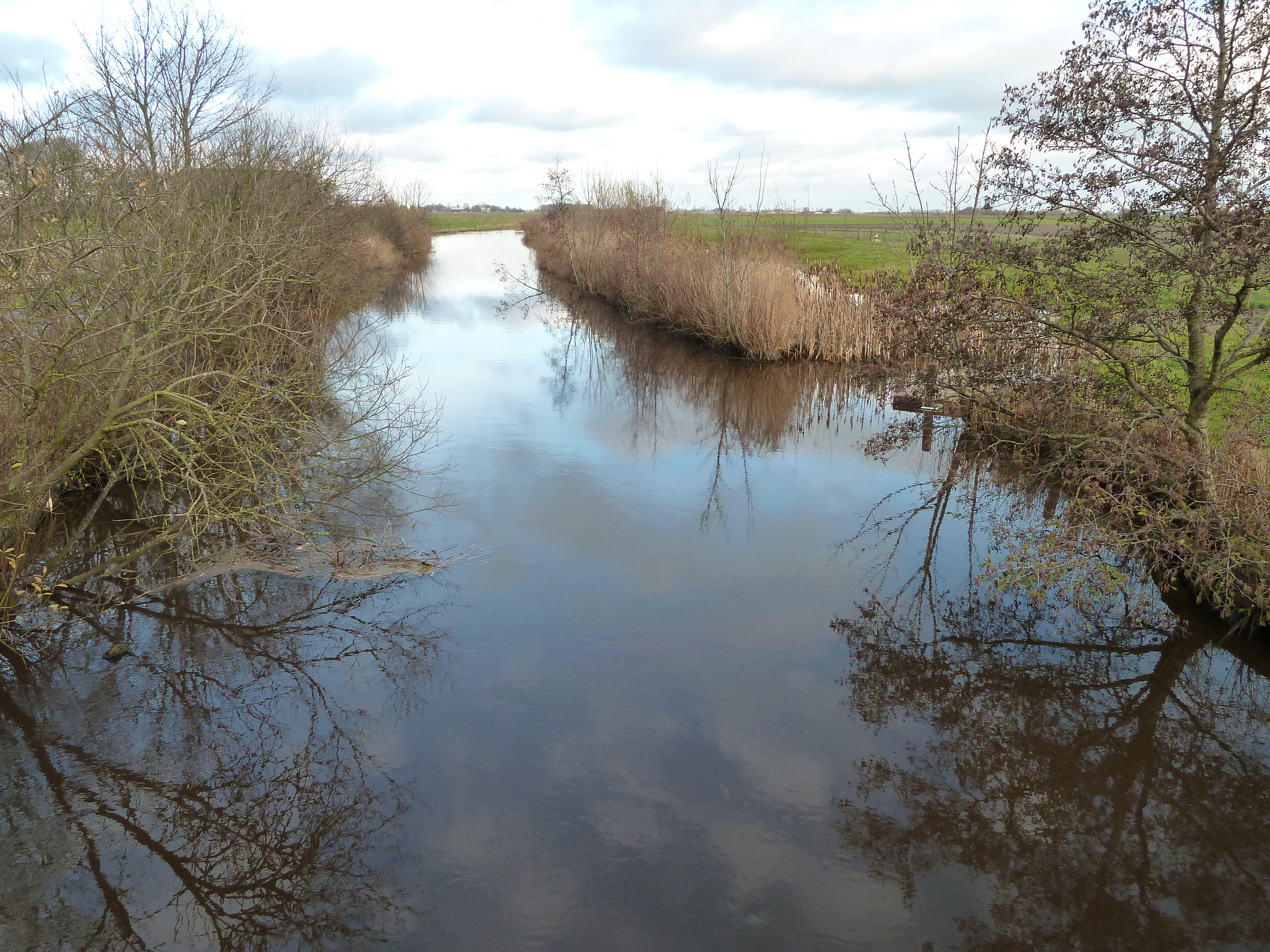 De Oude Lauwers nabij het buurtschap De Leegte, gezien in de richting van het noorden.